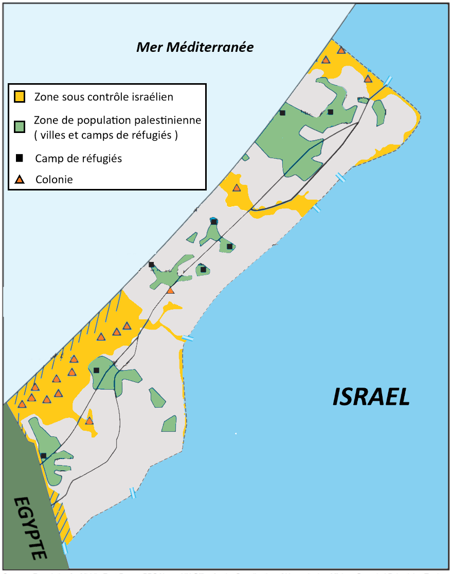 Répartition de la population dans la Bande de Gaza en 2001. La Bande de Gaza fait 350 km². 120 km² sont sous contrôle israélien. La population est de 1.500.000 personnes sont 1.070.000 réfugiés et 8.000 colons. Ils sont répartis dans 13 villes, 8 camps et 21 colonies.